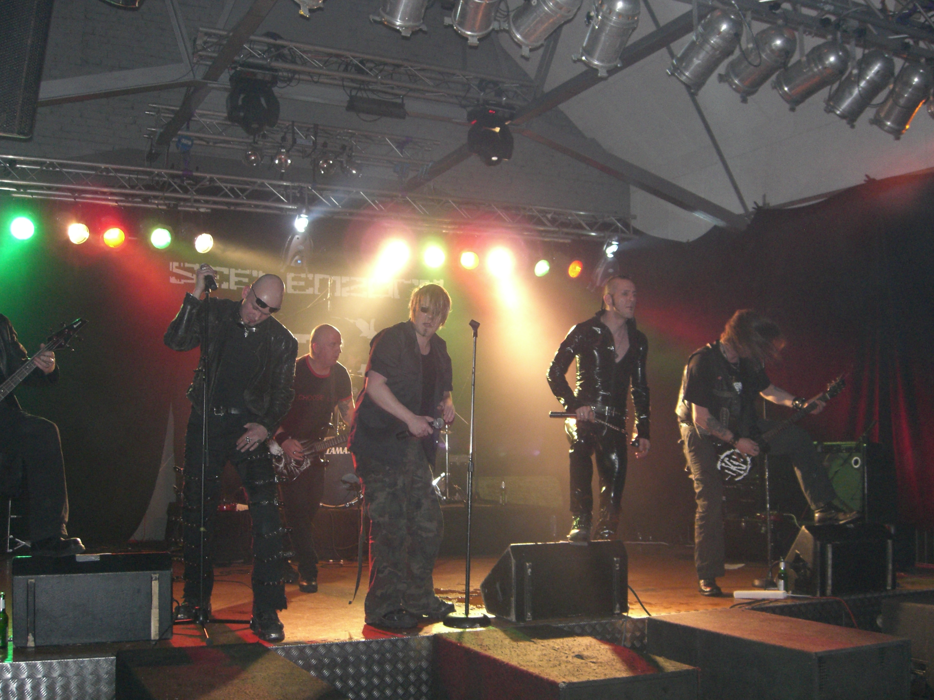 SEELENZORN live - M.O.D.E. Masters Of Dark Entertainment, Live Factory, Adelsheim